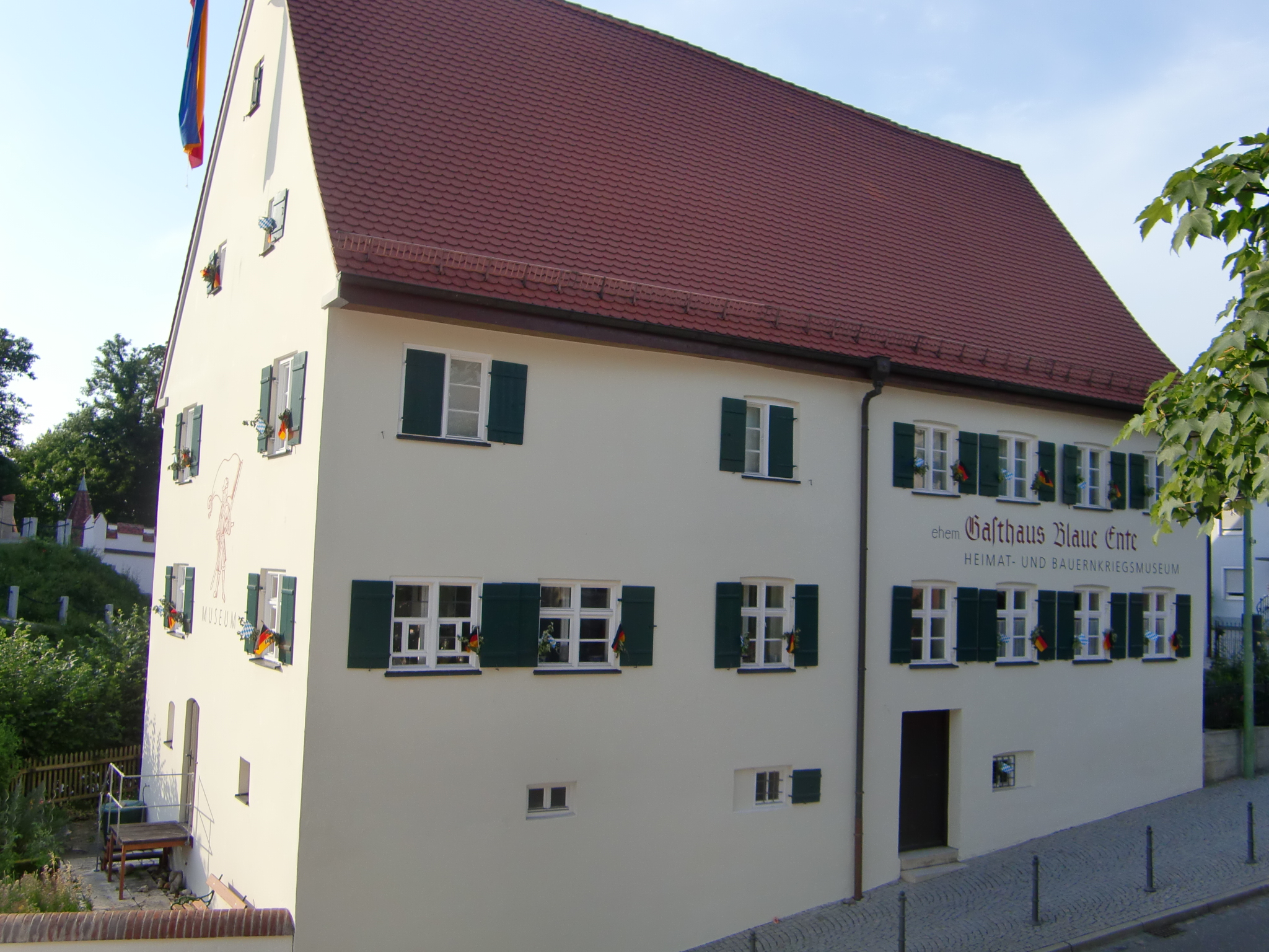 Ehem. Gasthaus Blaue Ente, jetzt Heimatmuseum mit Heimatstube, zwei- und dreigeschossig, mit steilem Satteldach, 17./18. JahrhundertThis is a photograph of an architectural monument.